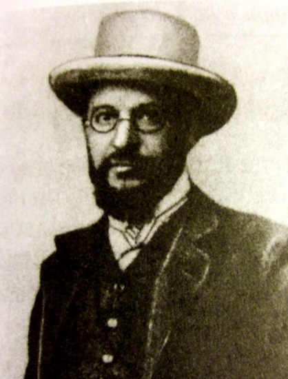 Социалист-революционер Абрам Рафаилович Гоц (1882-1940)